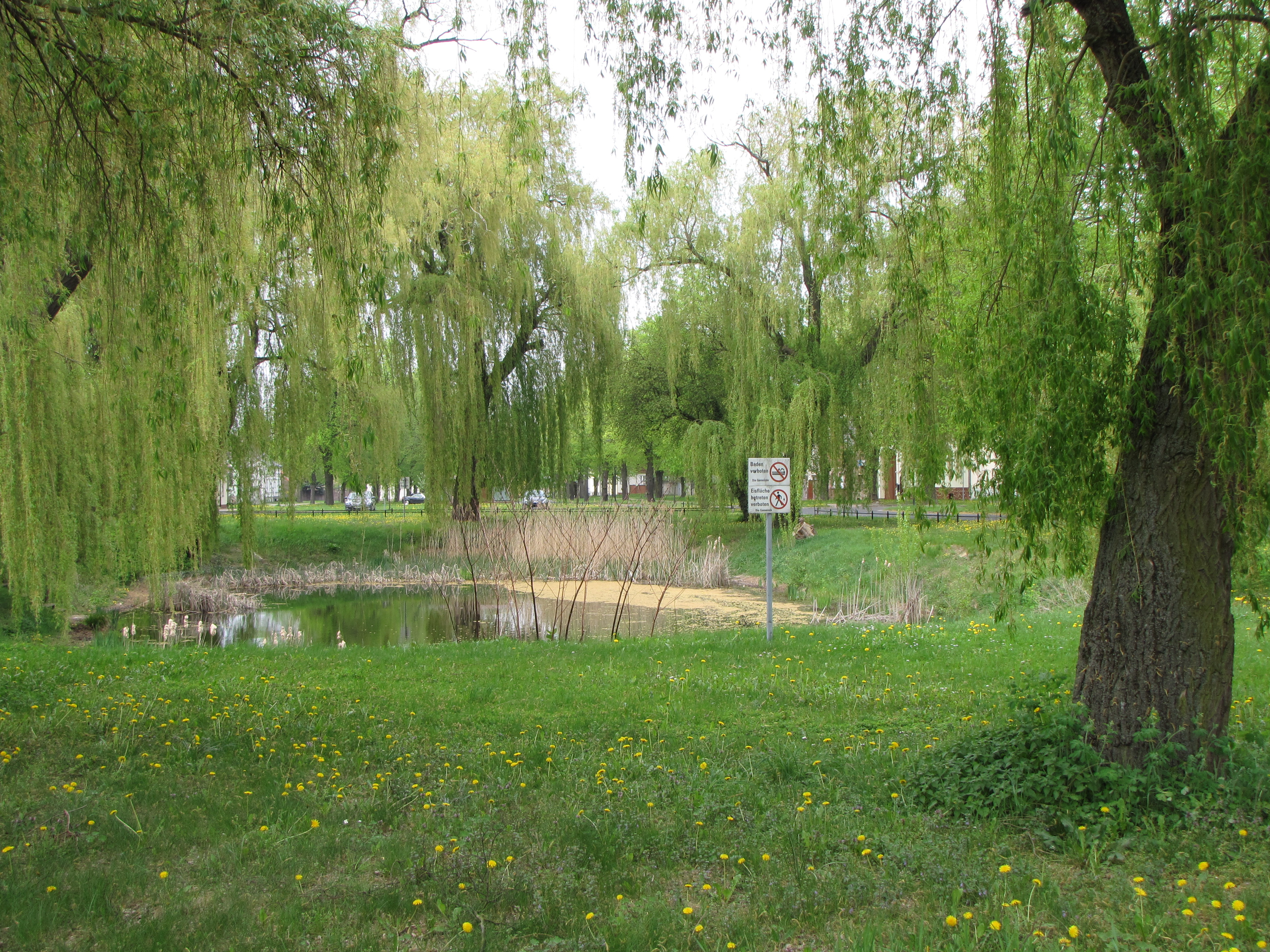 Glienick, Stadt Zossen, Brandenburg, Deutschland, Teich auf der Dorfaue